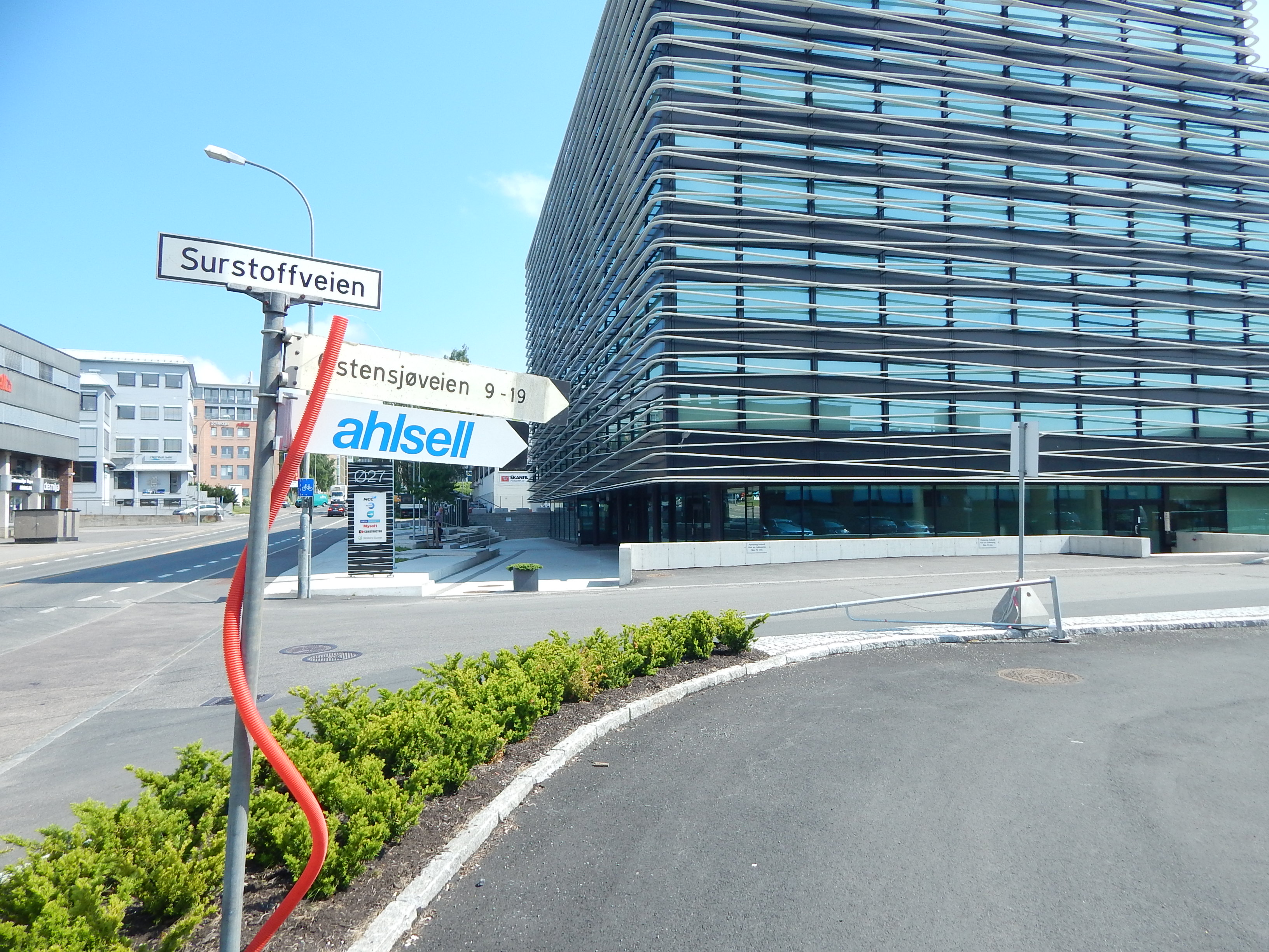 Surstoffveien ved Østensjøveien